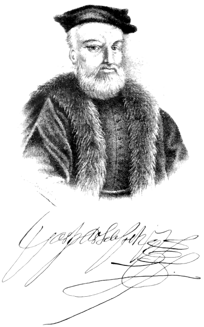 Don Andrés Hurtado de Mendoza, Marqués de Cañete. III Virrey del Perú (1555-1560).